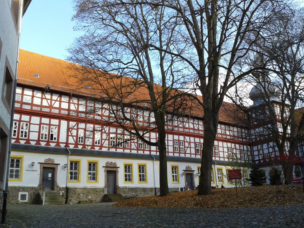 Schloss in Herzberg am Harz, Flügel des Amtsgerichts